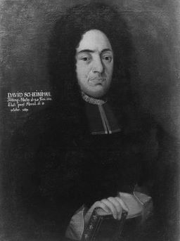 David Scheinemann (1662-1702), deutscher Jurist, Professor für natur- und Völkerrecht in Tübingen, 1689 o. Prof. der Moral, 1692 o. Prof. für Natur- und Völkerrecht, 1694/95 und 1700 Rektor (PND-ID: 117194433). Gemälde, 1689, Professorengalerie, Universität Tübingen, Inventar: 97/233a.